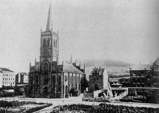 Johanniskirche, Barmen, Foto von 1872. Kirche wurde am 30. Mai 1943 durch Bomben zerstört.